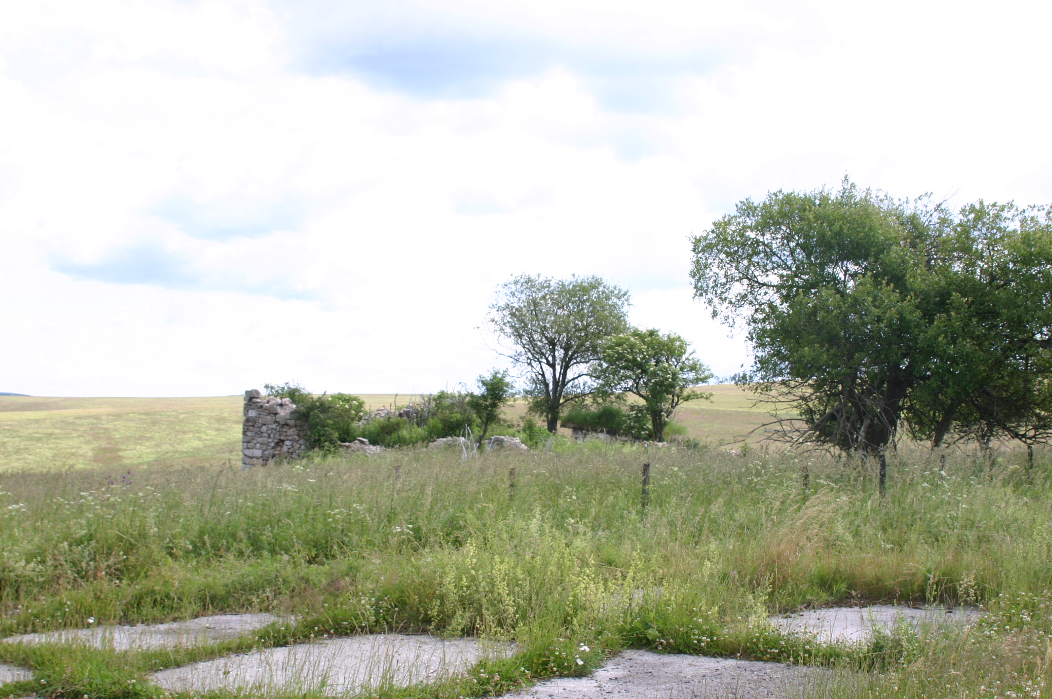 Platz der ehemaligen Gemeinde Grünwald (Pastviny) im Bezirk Teplitz.